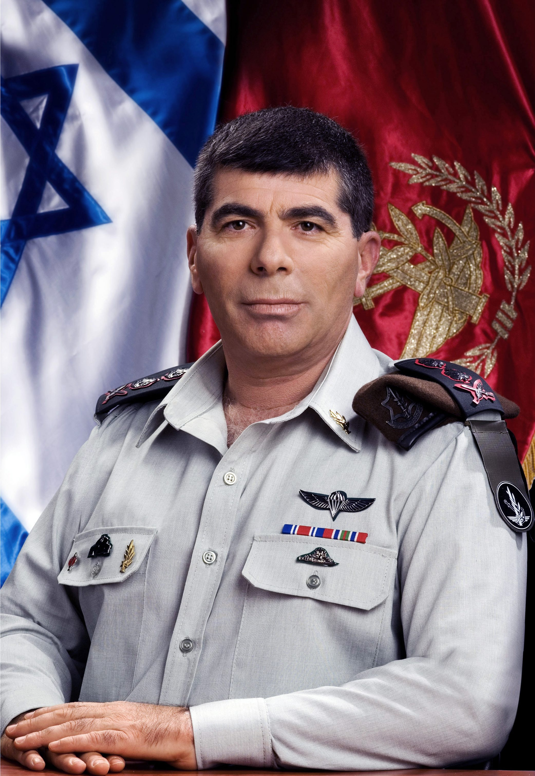 הרמטכ"ל רא"ל גבי אשכנזי.